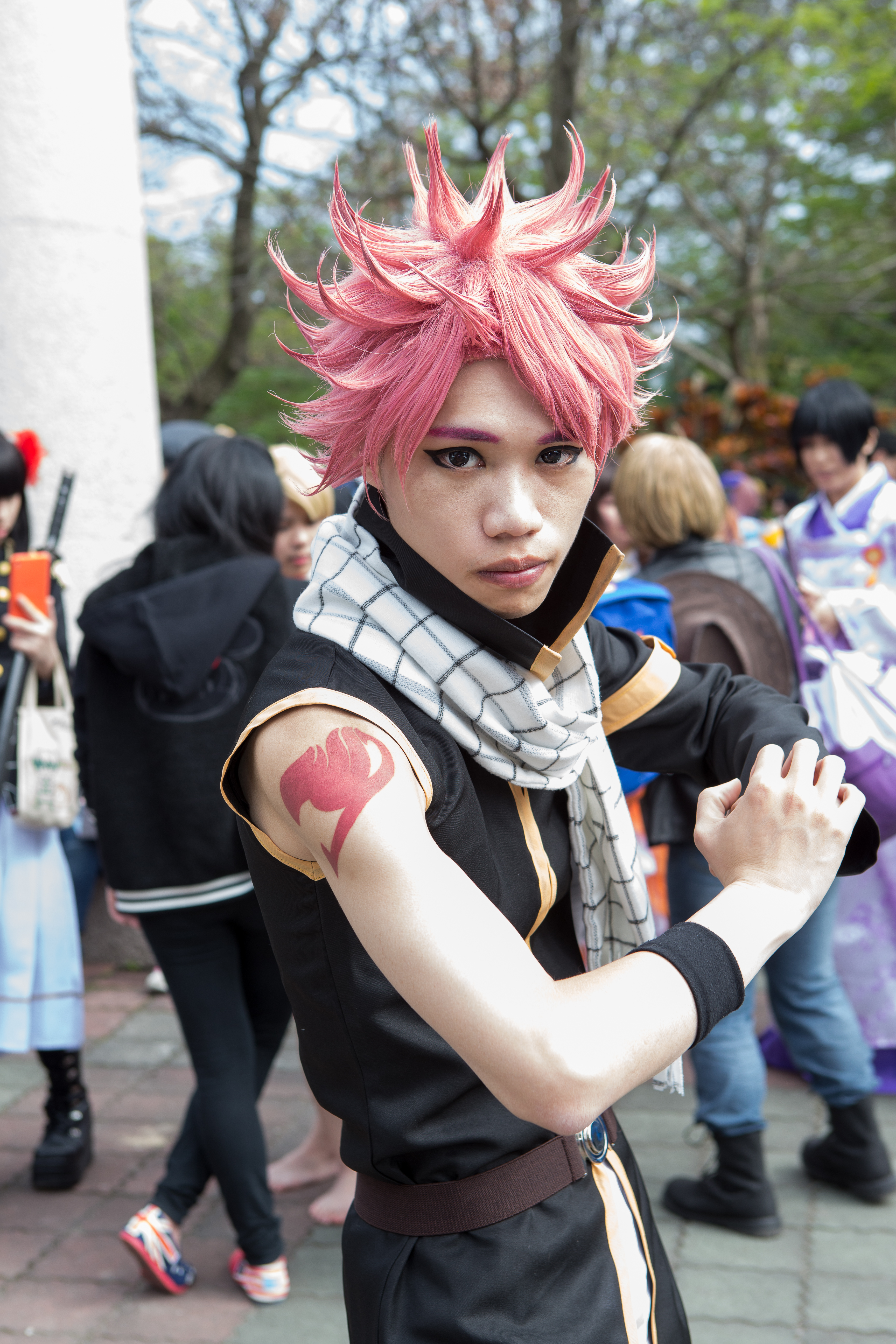 第39屆台灣同人誌販售會，《魔導少年》納茲·多拉格尼爾cosplayer。